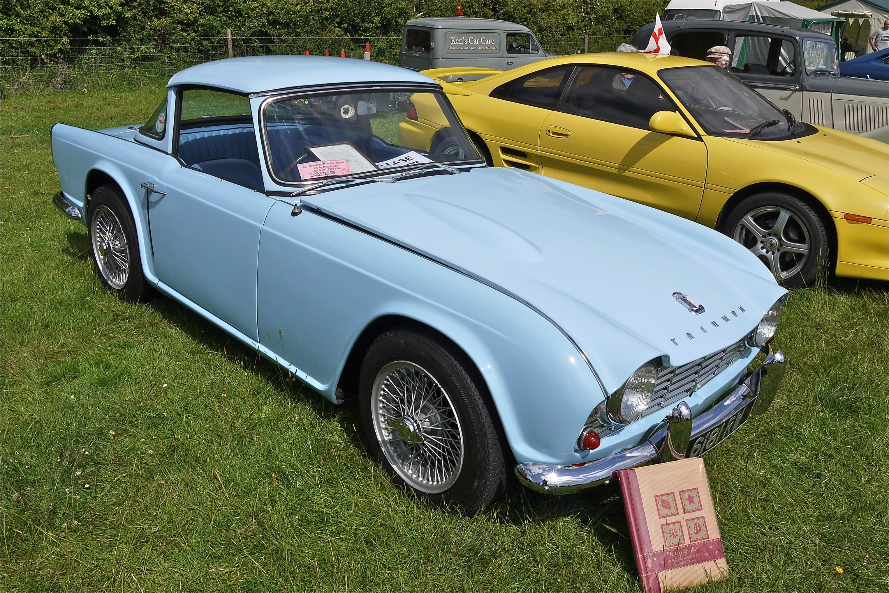 Panasonic G1 14-45 Lens